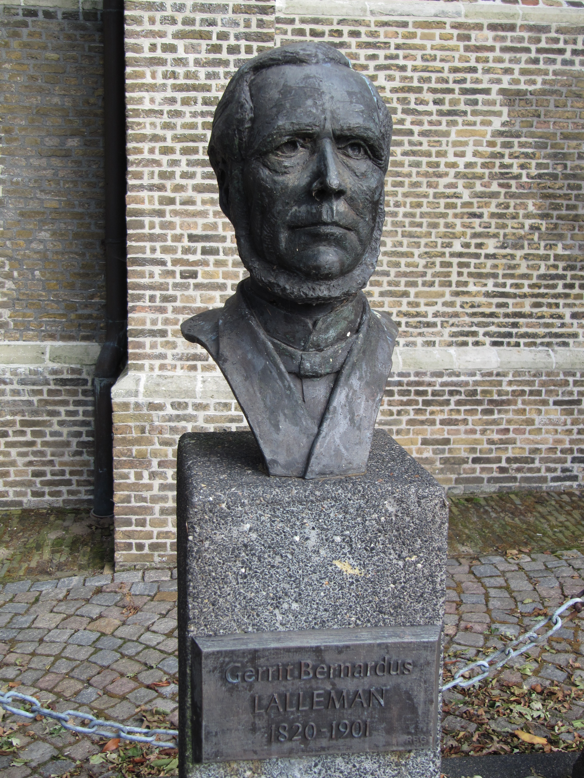 Beeld van Gerrit Bernardus Lalleman op het Kerkplein in Moordrecht. 43 jaar schoolhoofd te Moordrecht. [1] Geboren te Naaldwijk op 29 januari 1820 en overleden te Amsterdam op 14 juli 1901. Sculptuur uit 1988 van John Vijgenboom